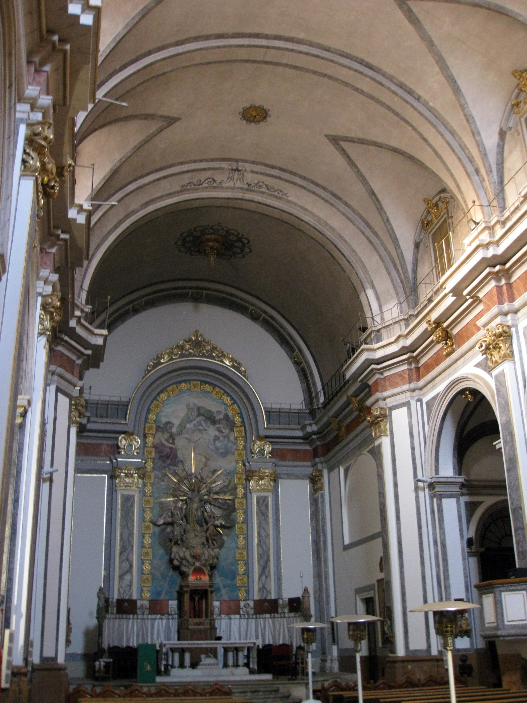 Església parroquial de l'Assumpció (Albocàsser) 02.003-009.